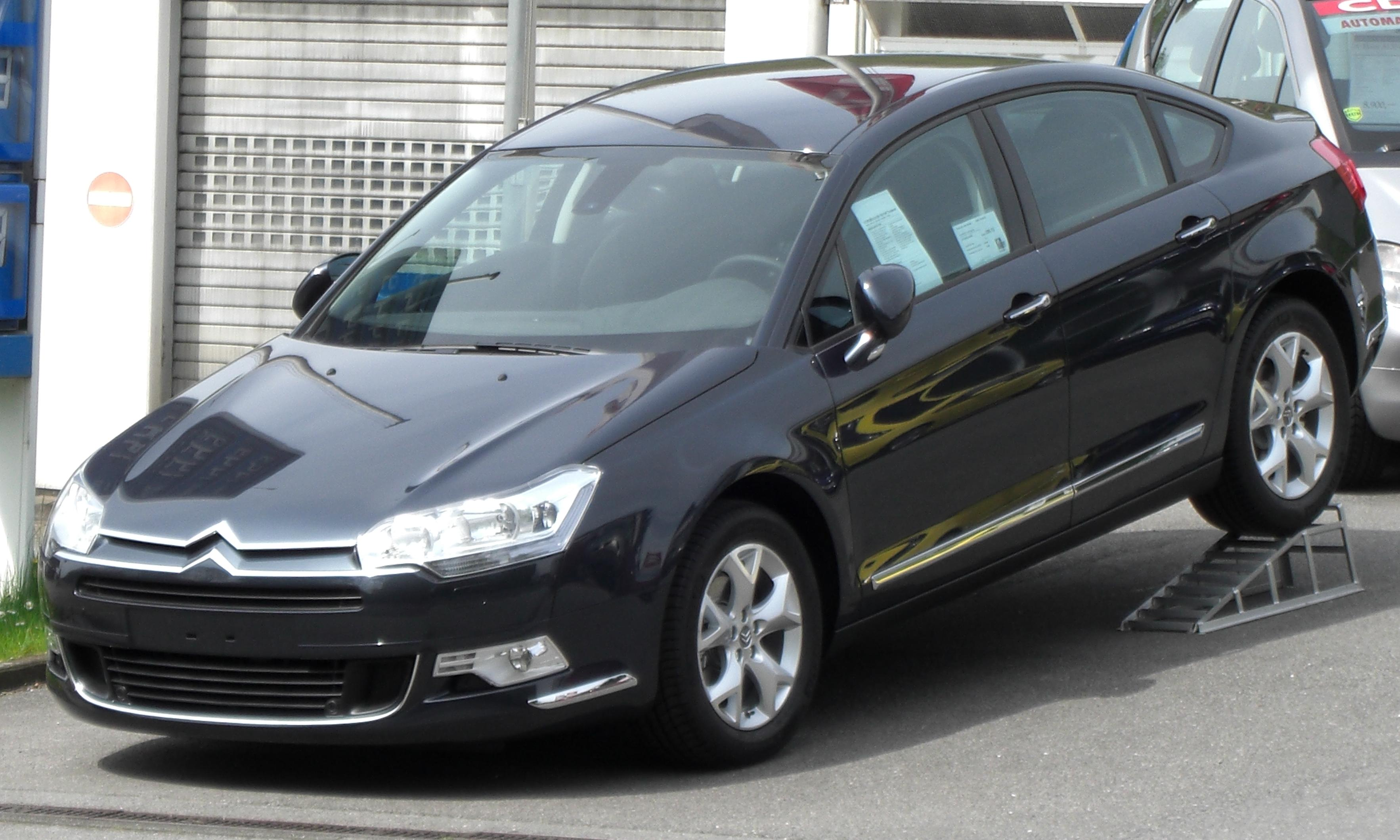 Citroen C5